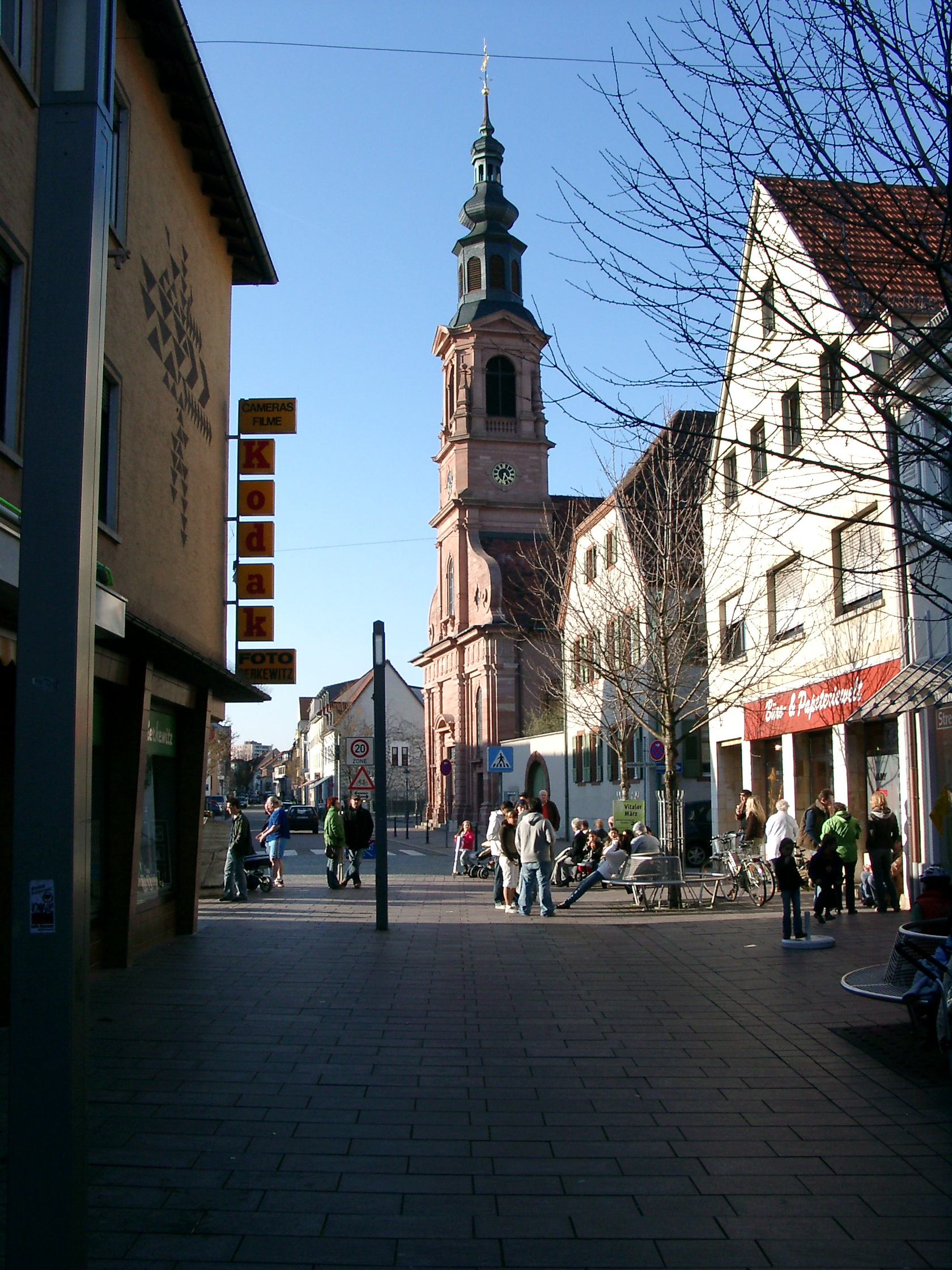 Schwetzingen, Blick von der Fussgängerzone auf die Evangelische Stadtkirche